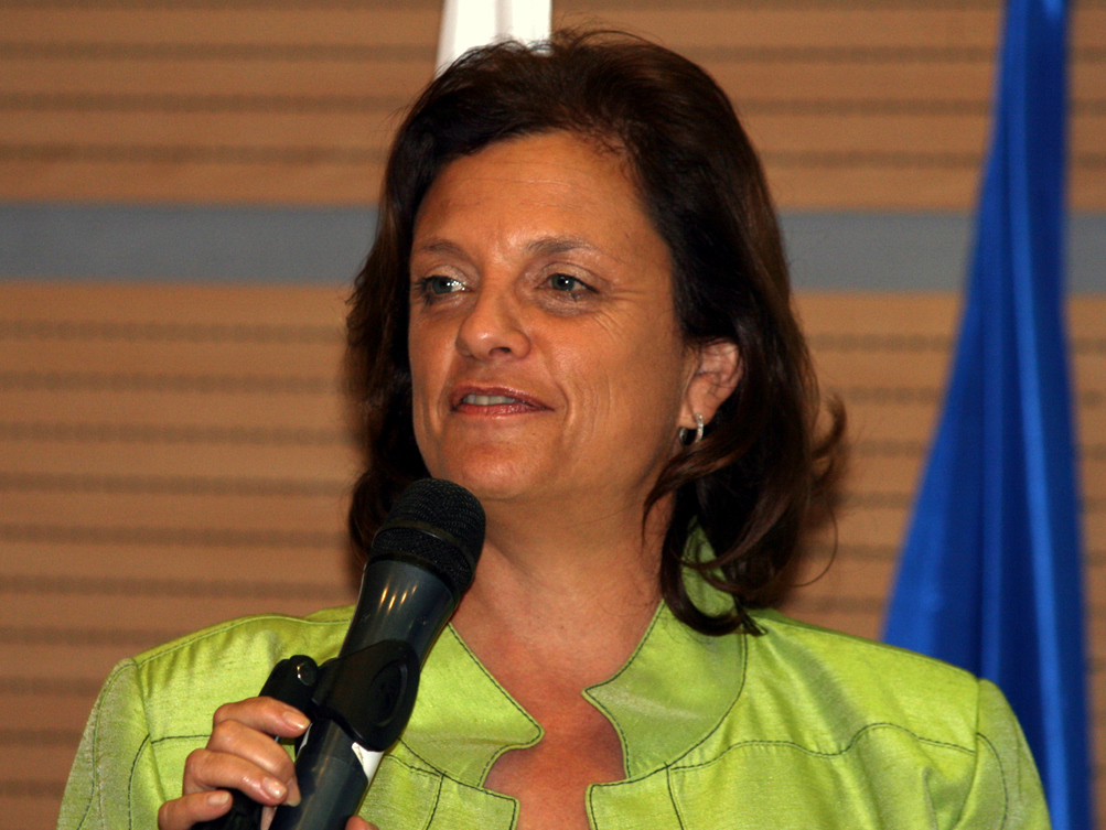 Yuli Tamir ministre israelien de l'éducation à Tel Hai